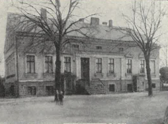 Gutshaus Feldichen in der Neumark vor 1945, aus: Clara Aumann, Feldichen 1815-1945, [in]: Kreis-Kalender für den Kreis Königsberg-Neumark, Helmstedt 1962, S. 57-66.